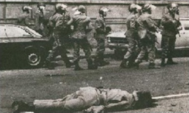 Giovedì nero